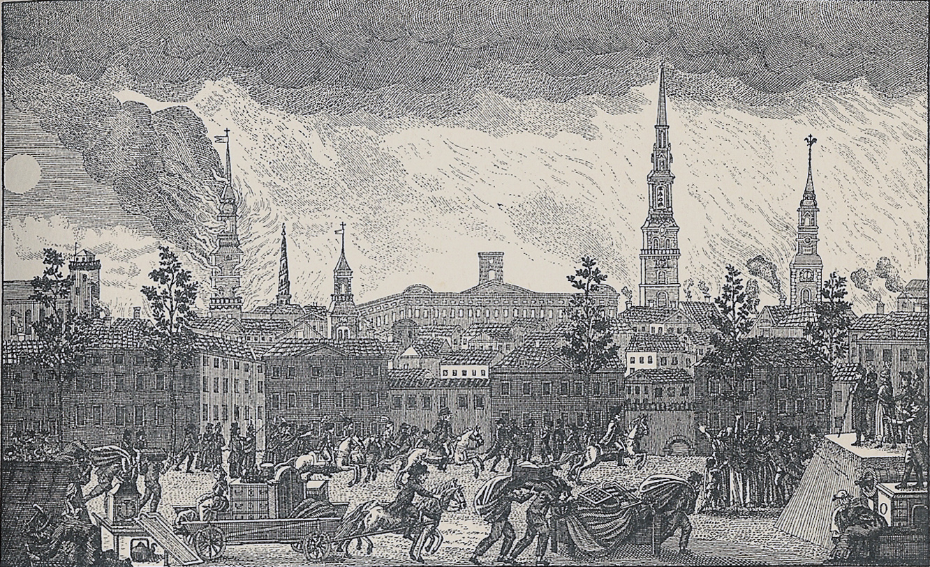 Københavns brand 5. juni set fra Ahlefelds Mølle lige før Nørregade. Efter stik af Fridrich.